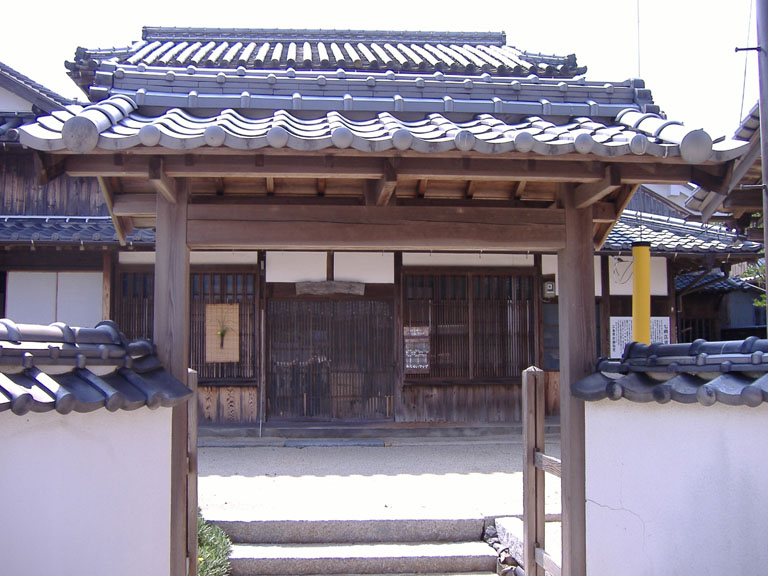 大崎下島の御手洗地区にある七卿落遺跡